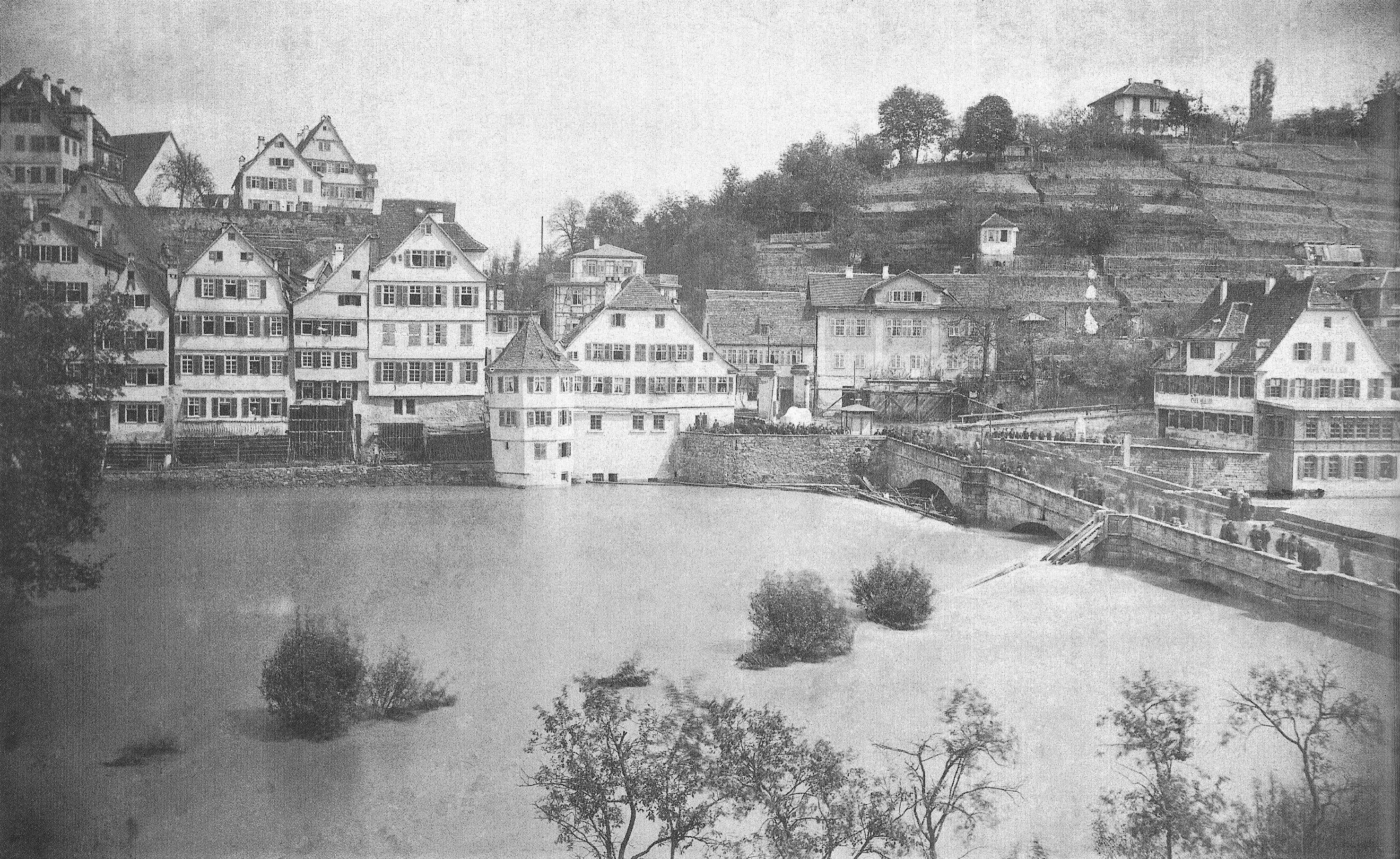 Tübingen. Hochwasser am Neckar bei der Eberhardsbrücke. Fotografie auf Glasplatte 160 × 245 mm.